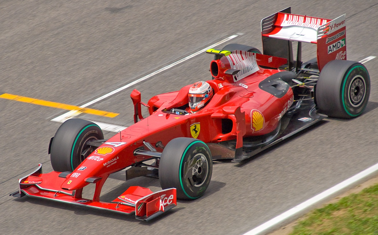 Nikon D90 + Sigma 18-200 DC OS HSM 1/1600s - F/9 - 200mm - ISO400